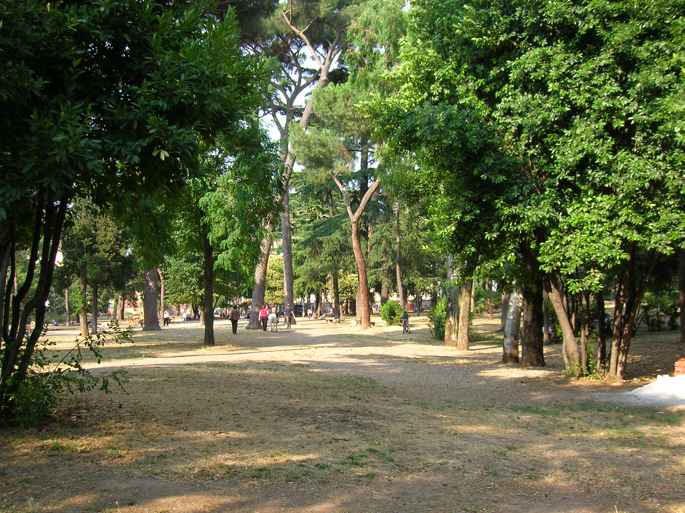 Villa Lazzaroni, park in Rome, Italy